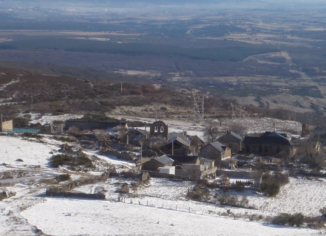 Vista invernal de la localidad de Foncebadón (León, España).